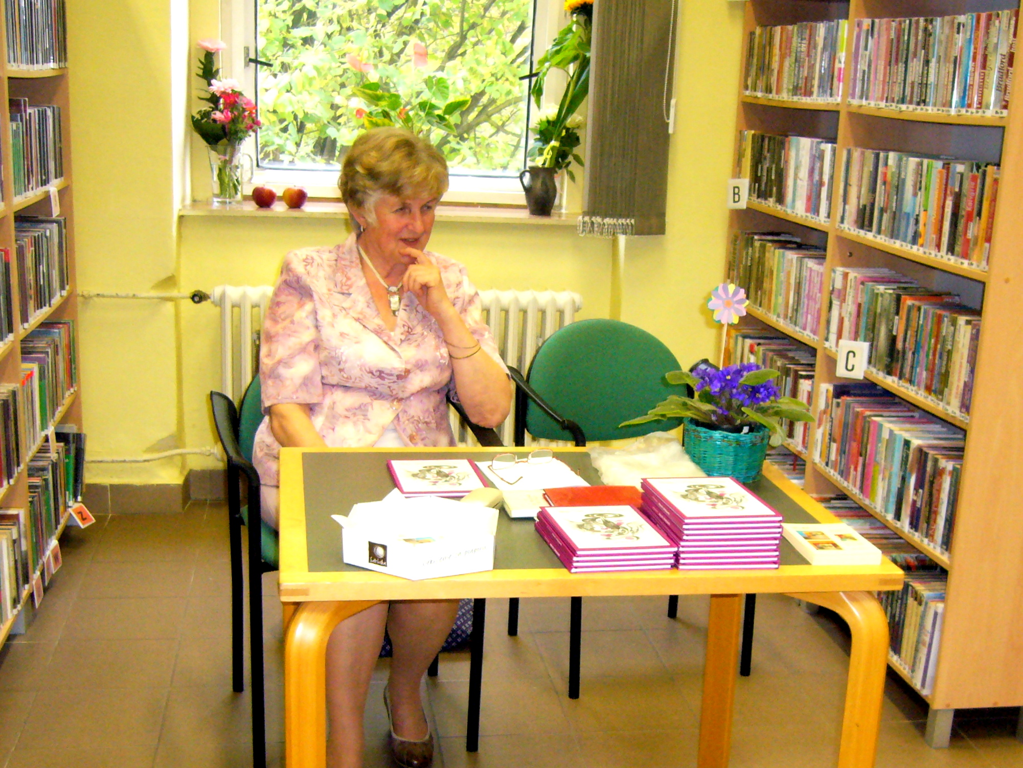 Jana Schlossarková